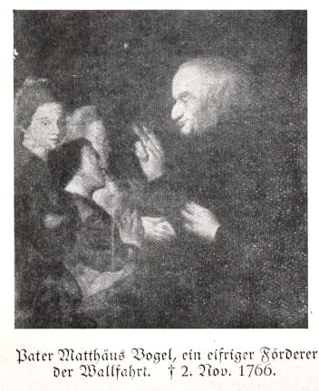 Pater Matthäus Vogel S.J. (1695-1766), religiöser Autor, Volksmissionar und Begründer der Loreto-Wallfahrt in Ludwigshafen-Oggersheim